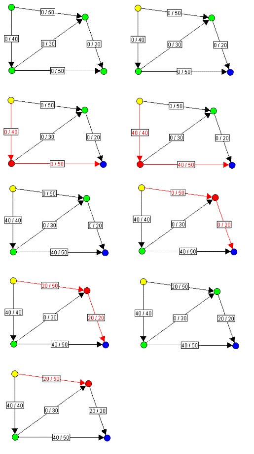 "Ford fulkerson algoritm turns"